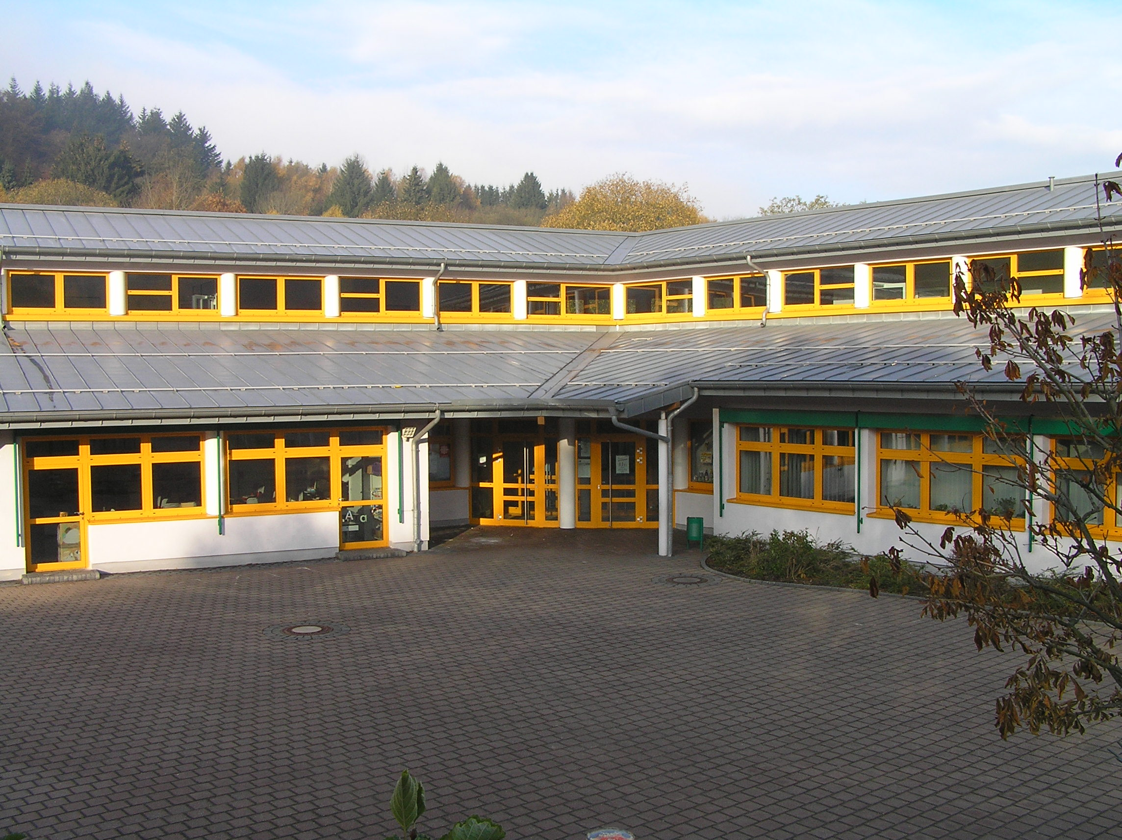 Grundschule Reifenberg in Niederreifenberg. Schulhof und Haupteingang